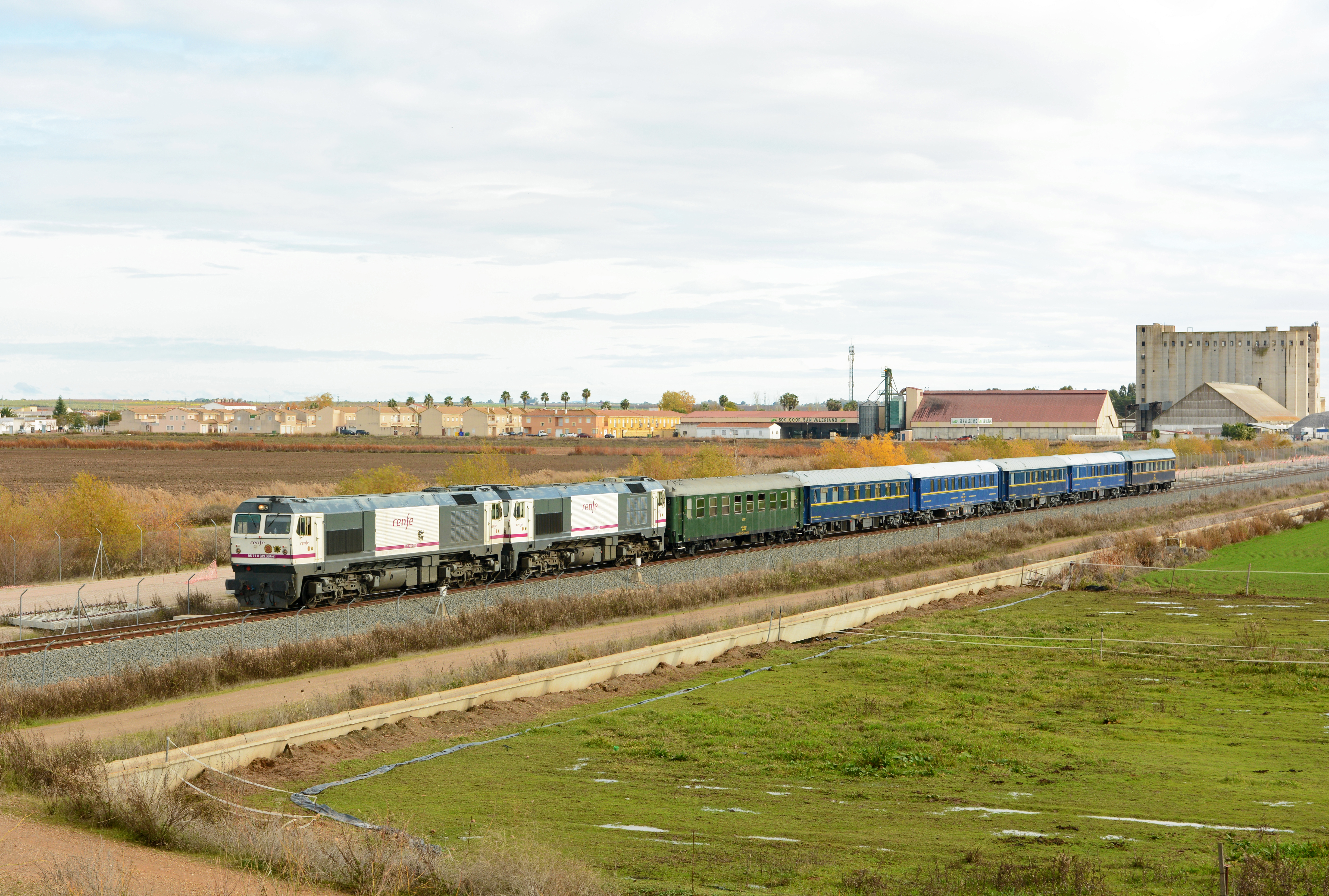 Tren Prestige - Mérida / Badajoz - 150 Años del Ferrocarril Madrid-Lisboa